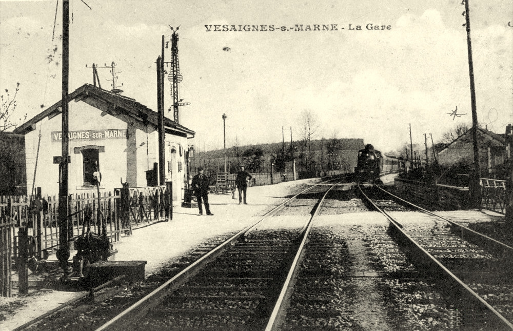 Carte postale de la gare vers 1910.